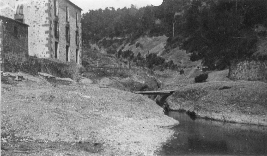 Vista parcial de l'Hostal del Fuster de Roquer vora la Ribera Salada. Cèsar August Torras i Ferreri (Entre 1890 i 1923)